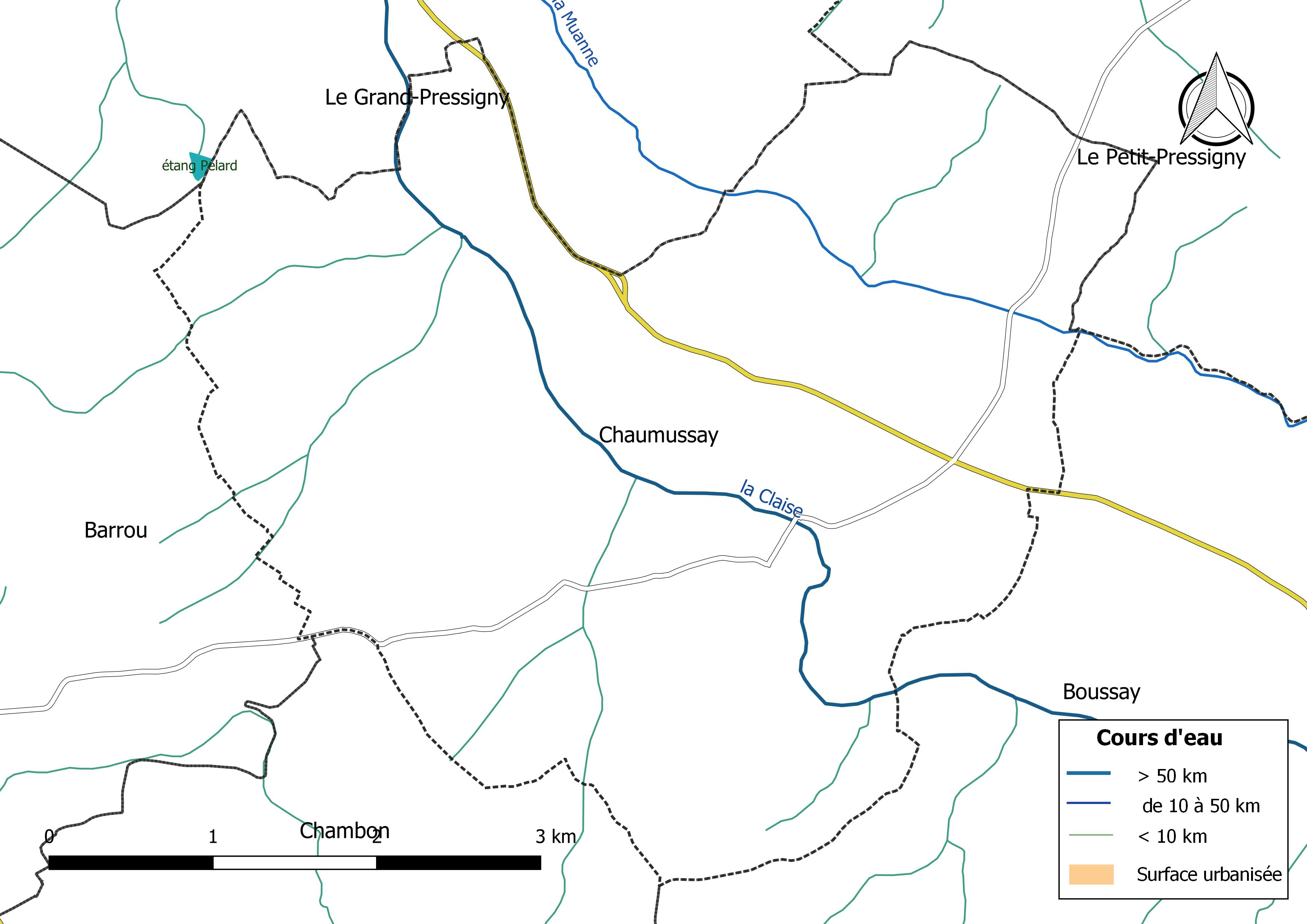 Carte du réseau hydrographique de la commune de Chaumussay (France).